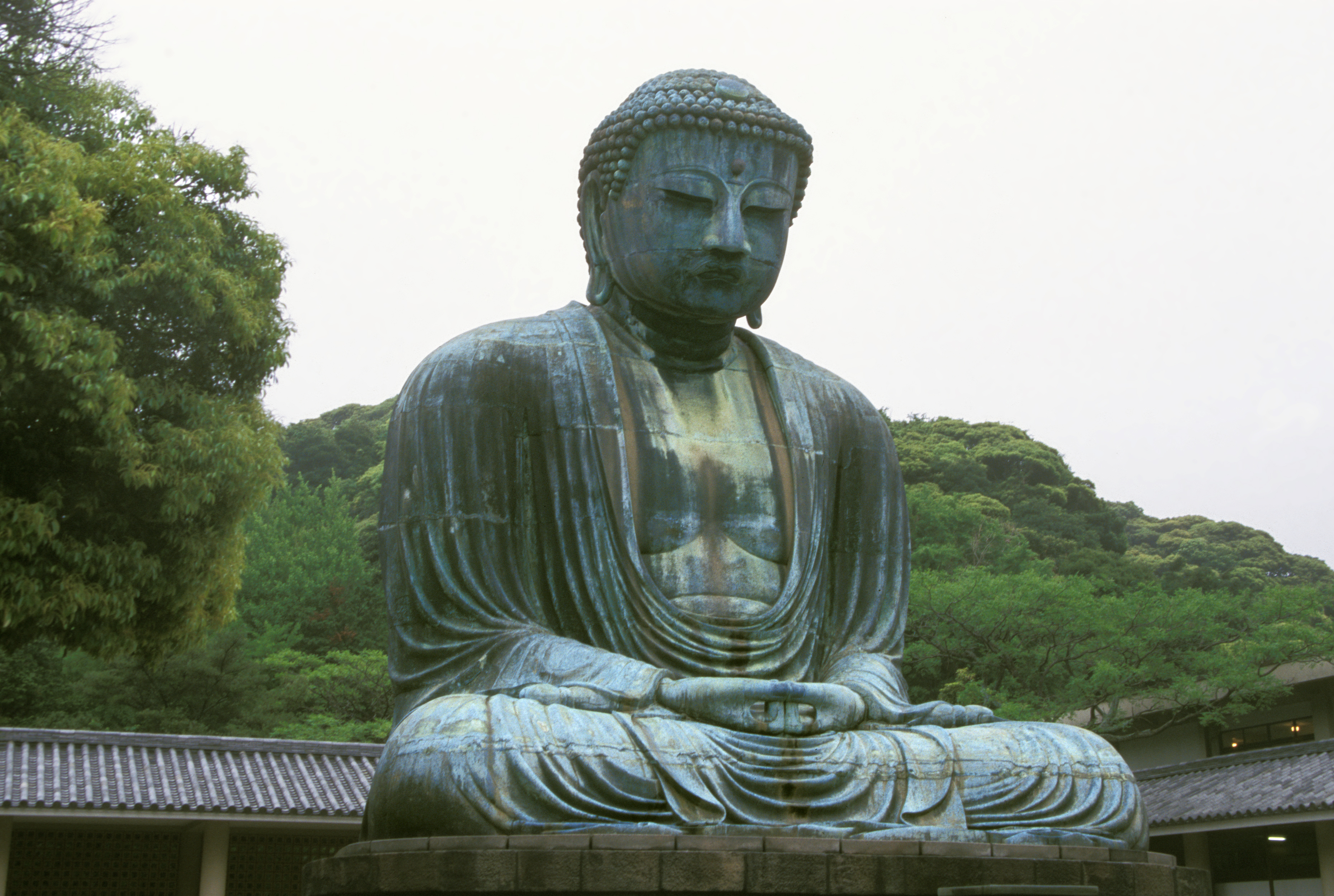 Buddha, Kamakura, Japan